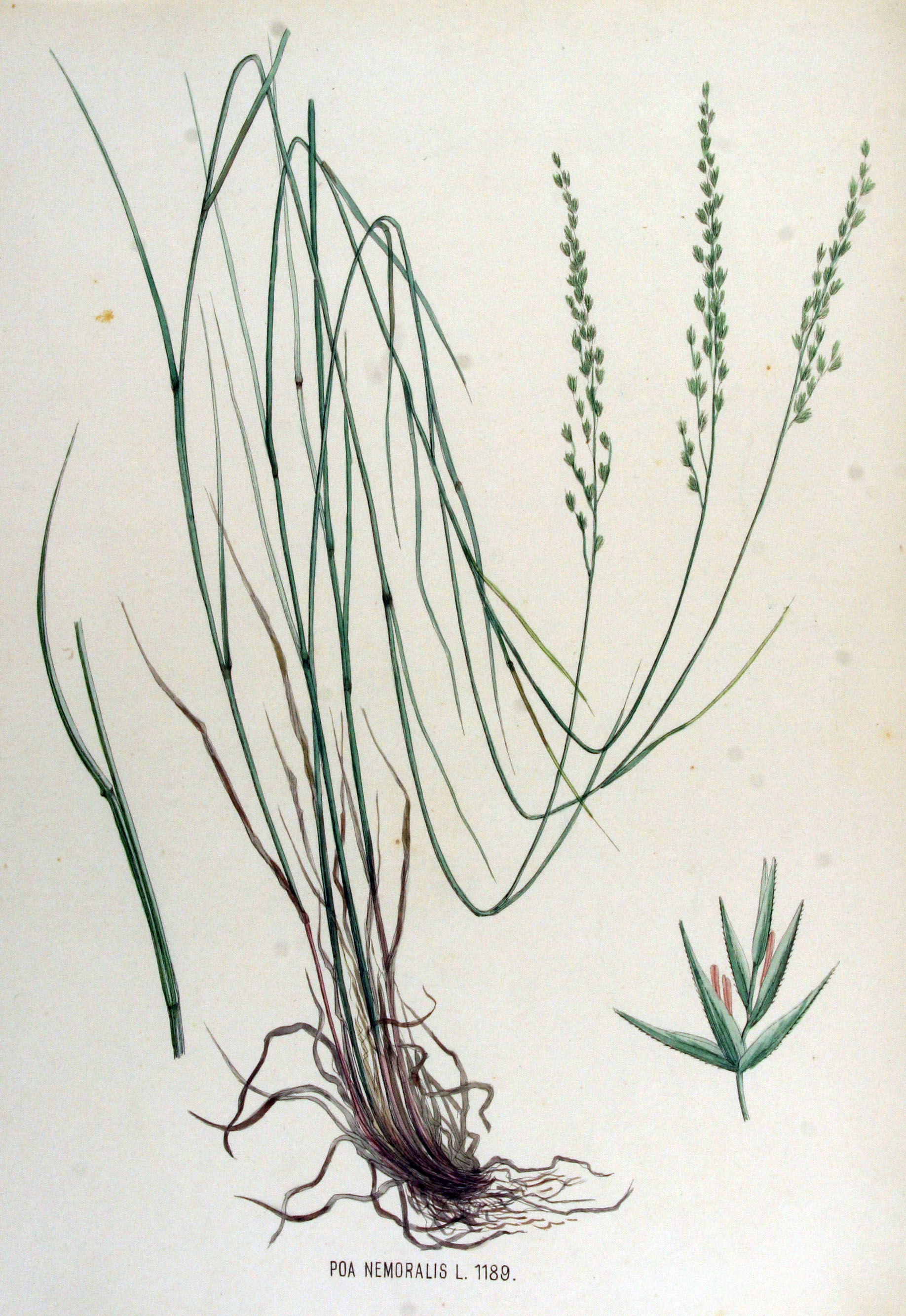 Poa nemoralis L.